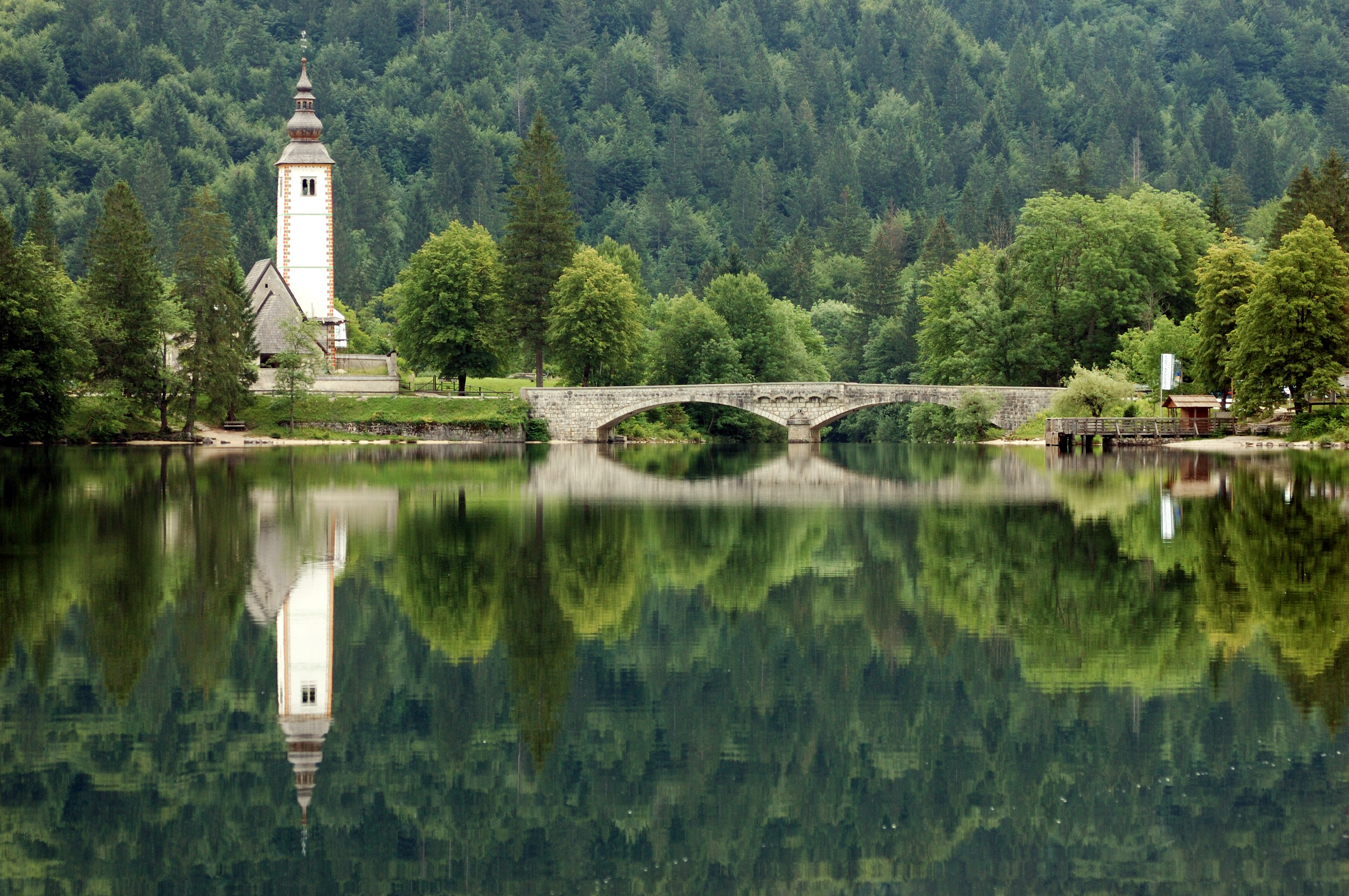 Lake Bohinj, Slovenia